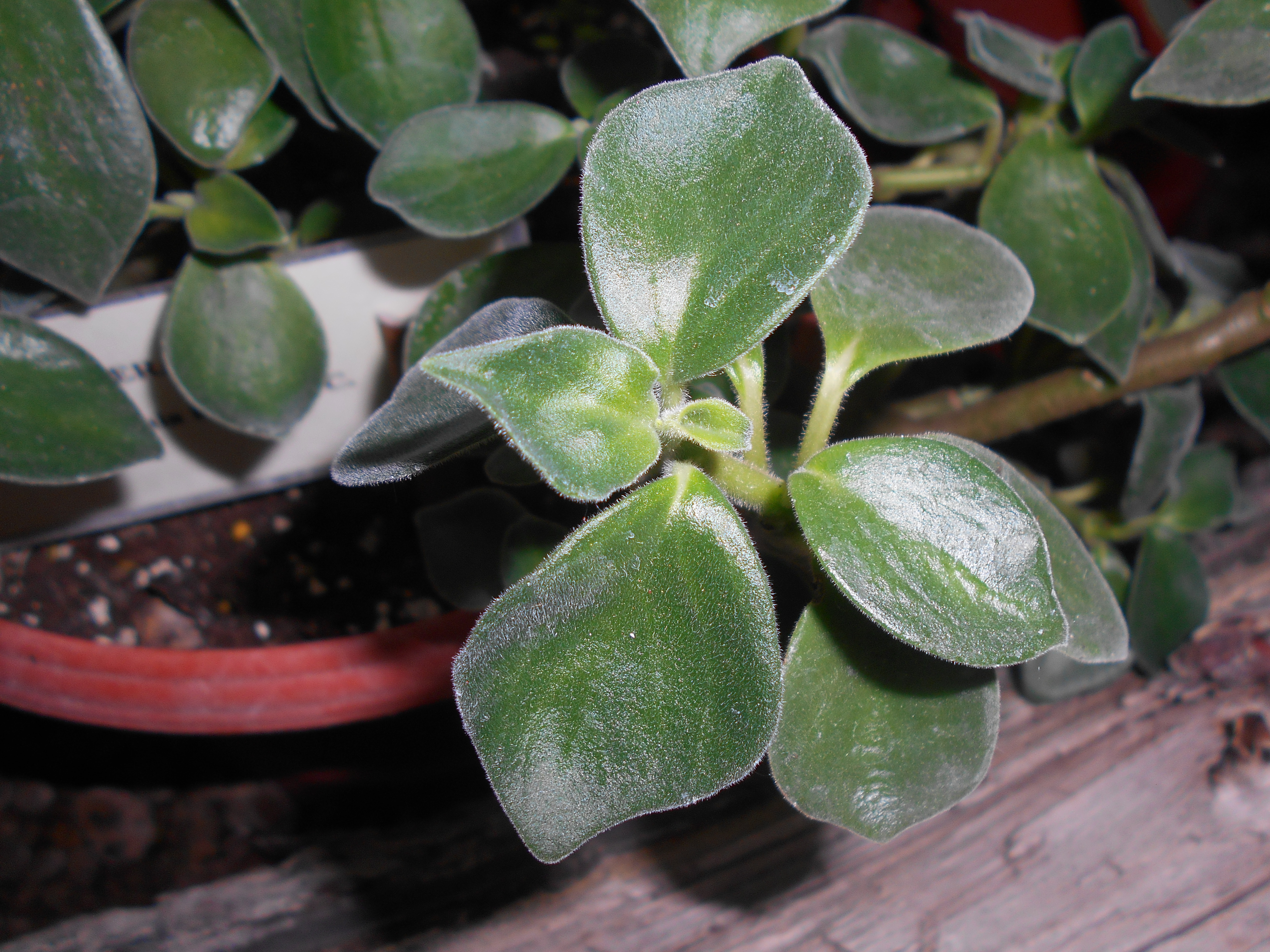 Peperomia hirta, Ogród Botaniczny UMCS w Lublinie